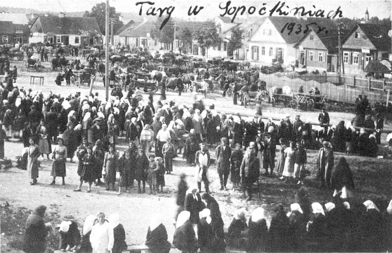 Беларуская (тарашкевіца): Сапоцкін (Sapockin), пляц Рынак (plac Rynak)